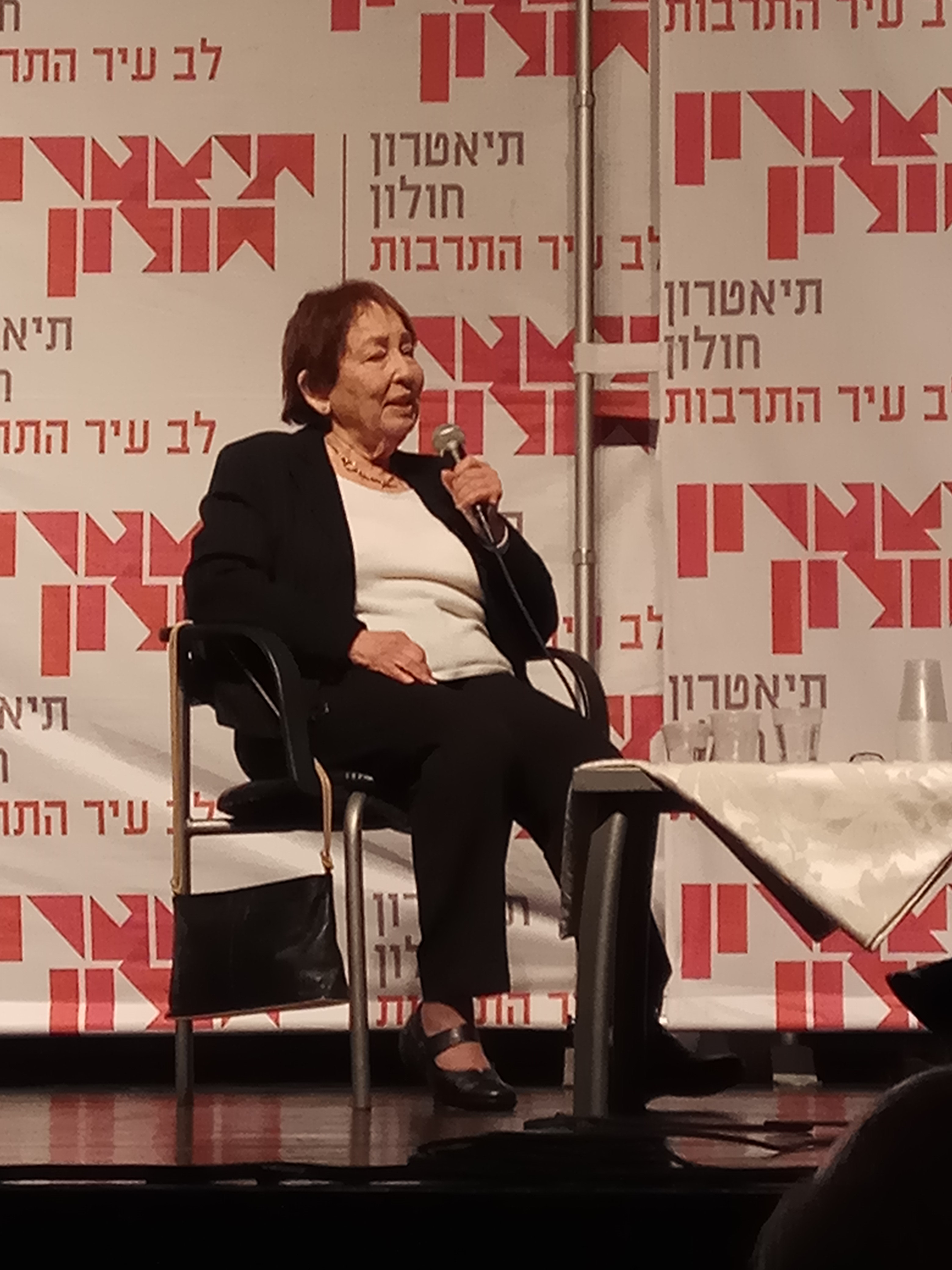 מינה צמח בשבתרבות בחולון